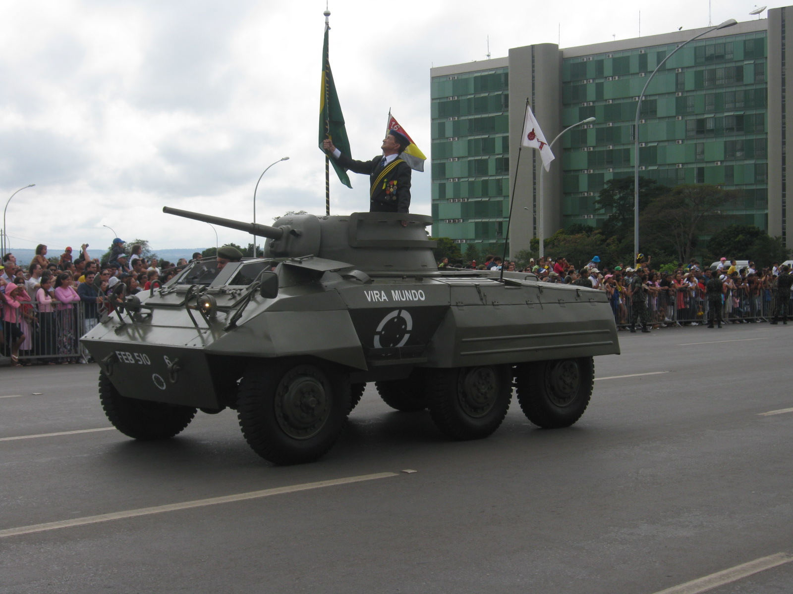 Tanques de Brasil